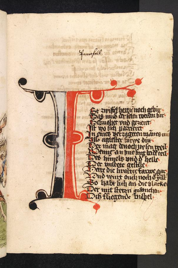 Wolfram von Eschenbach, Parzival, Beginn Prolog. Aus: Wolfram von Eschenbach, Parzival (Handschrift), Hagenau, Werkstatt Diebold Lauber, um 1443-1446, Cod. Pal. germ. 339, I. Buch, Blatt 6r. Bildtitel: "Ist zwiffel hertzen noch gebur..." (Beginn Handschrift)